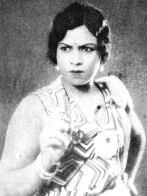 Fatima Begum (vers 1925)